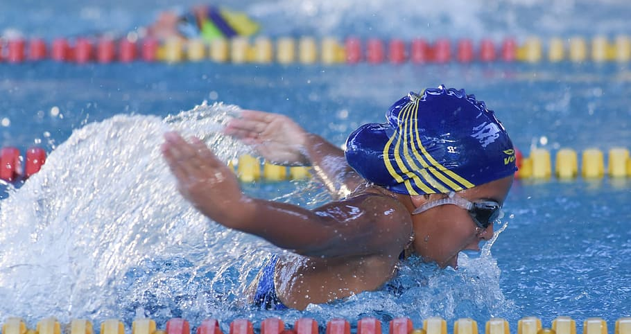 Uima-altaassa ui uimari. Uimarilla on päässään uimalakki ja uimalasit.